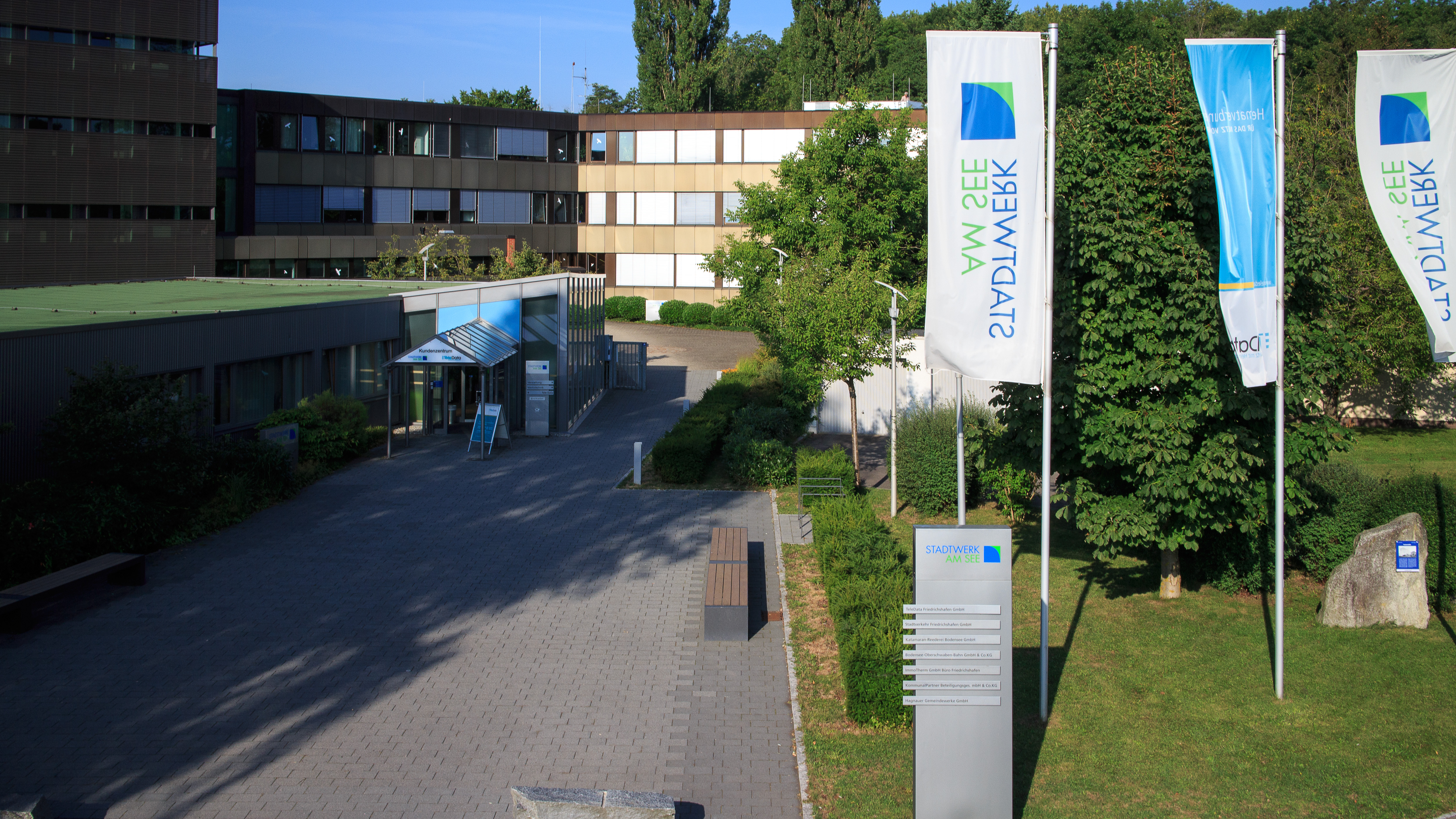 Verwaltungssitz in Friedrichshafen